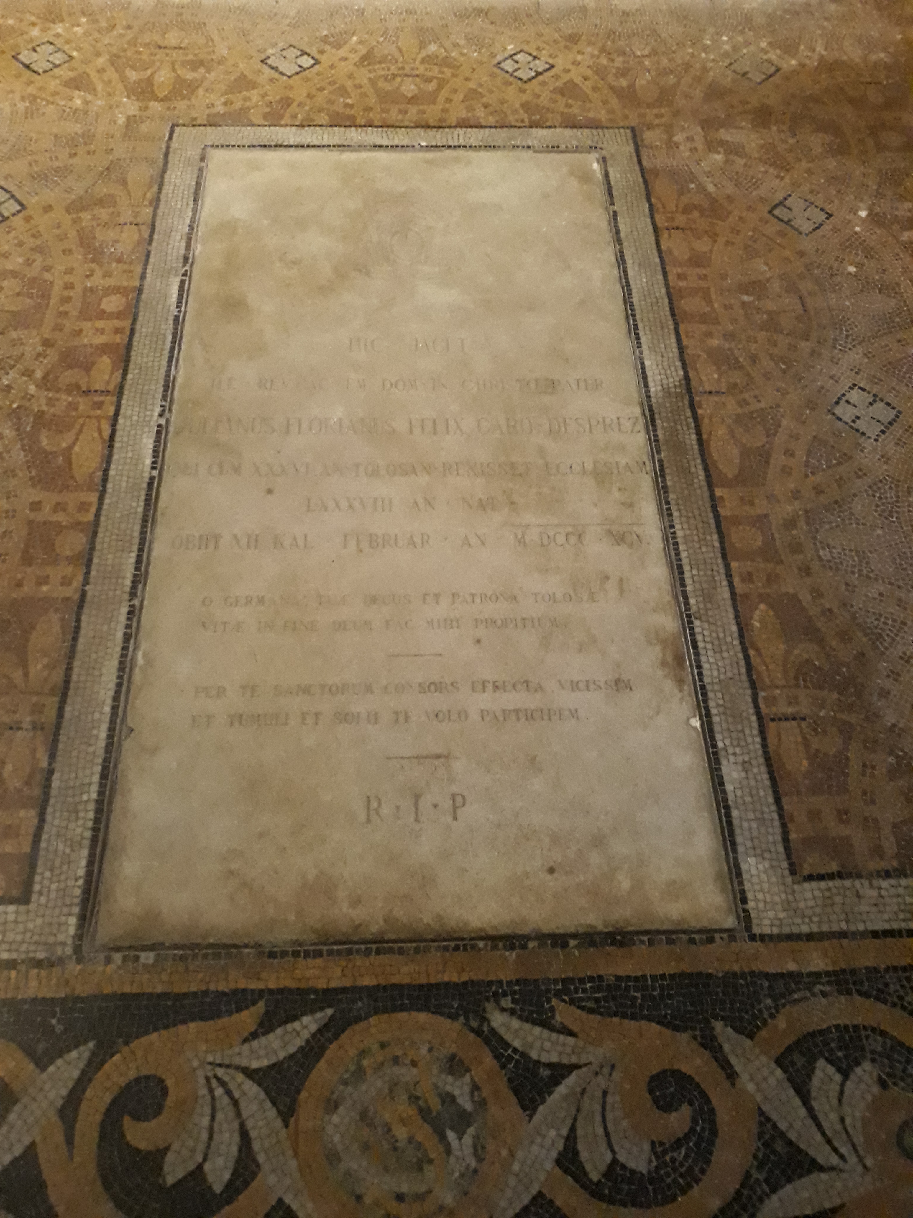 Das Grab des Erzbischofs von Tolulouse Florian Desprez in der Kathedrale von Toulouse.